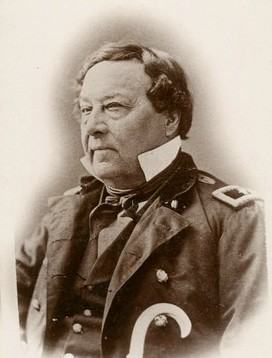 Benjamin Louis Eulalie de Bonneville, Union Army, Missouri Historical Society